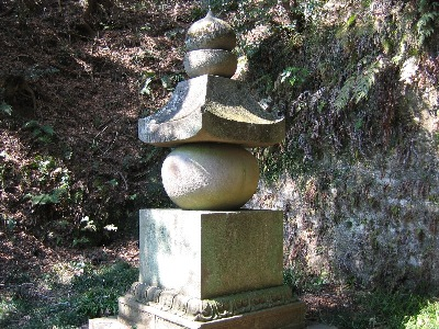 覚賢塔(大五輪塔) 鎌倉市